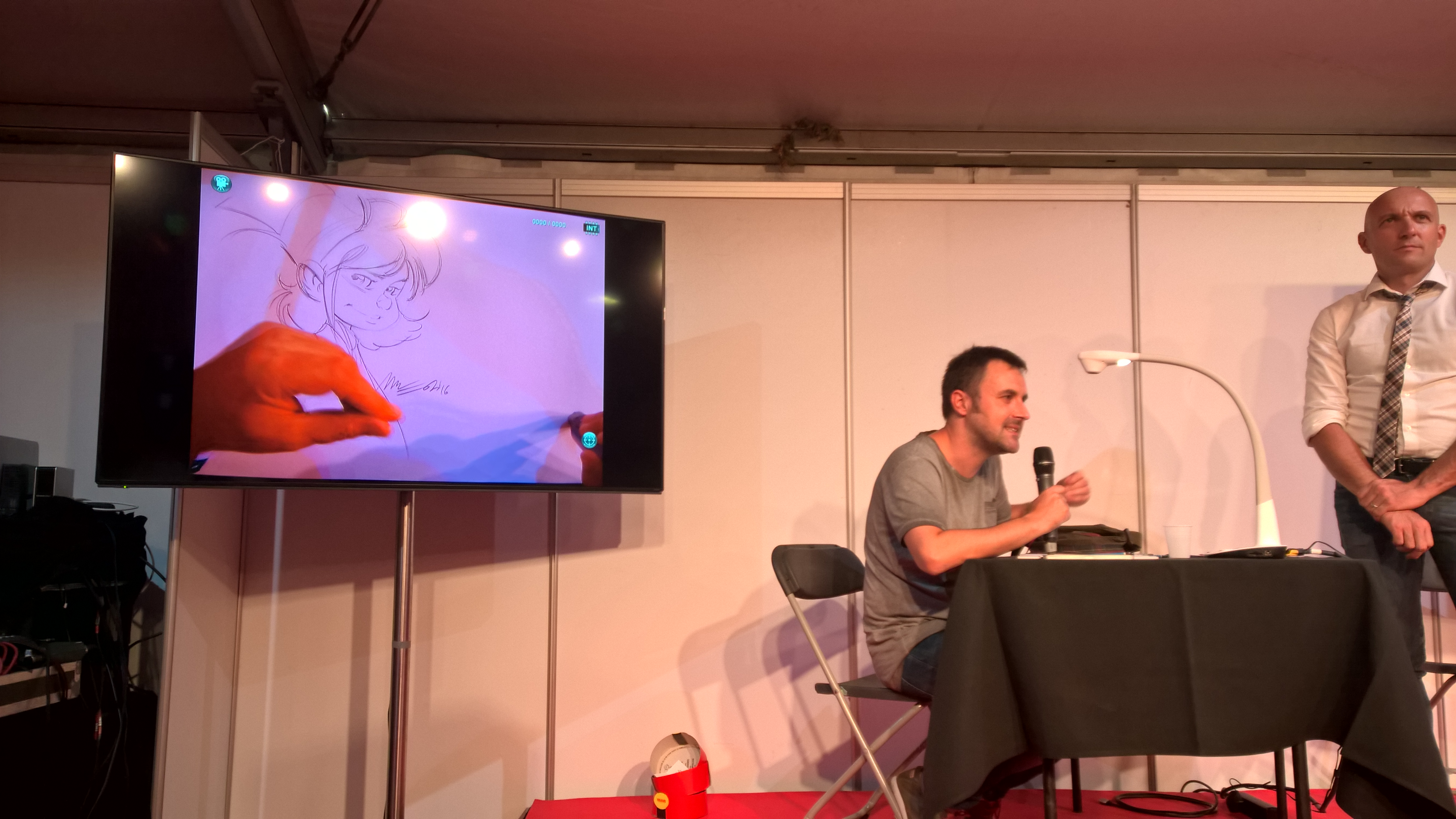 Master class avec José Luis Munuera lors du festival Spirou 2016.